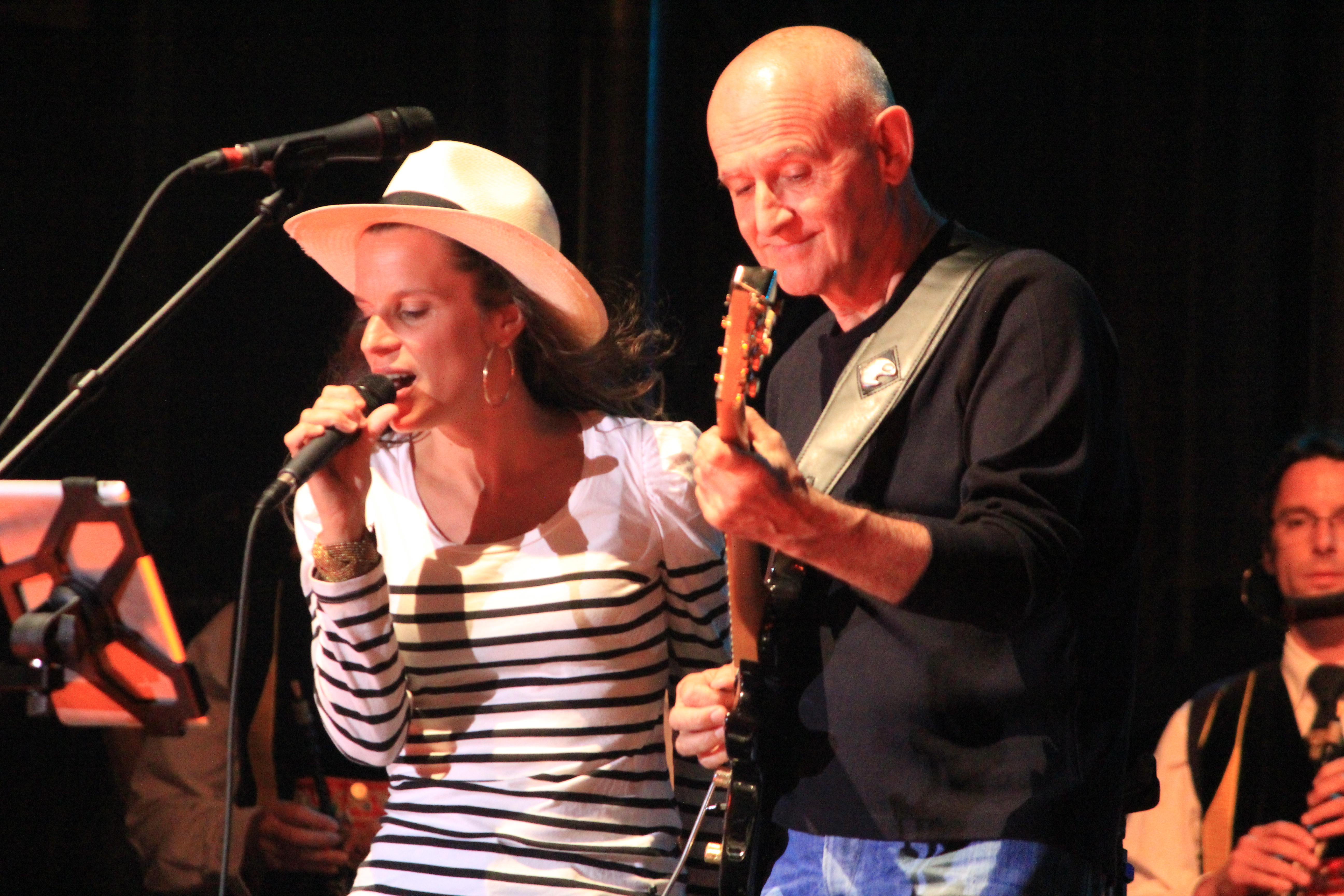 Dan Ar Braz et Clarisse Lavanant lors du concert inaugural de la tournée liée à la promotion de l'album Celebration, lors du Festival Interceltique de Lorient 2012.